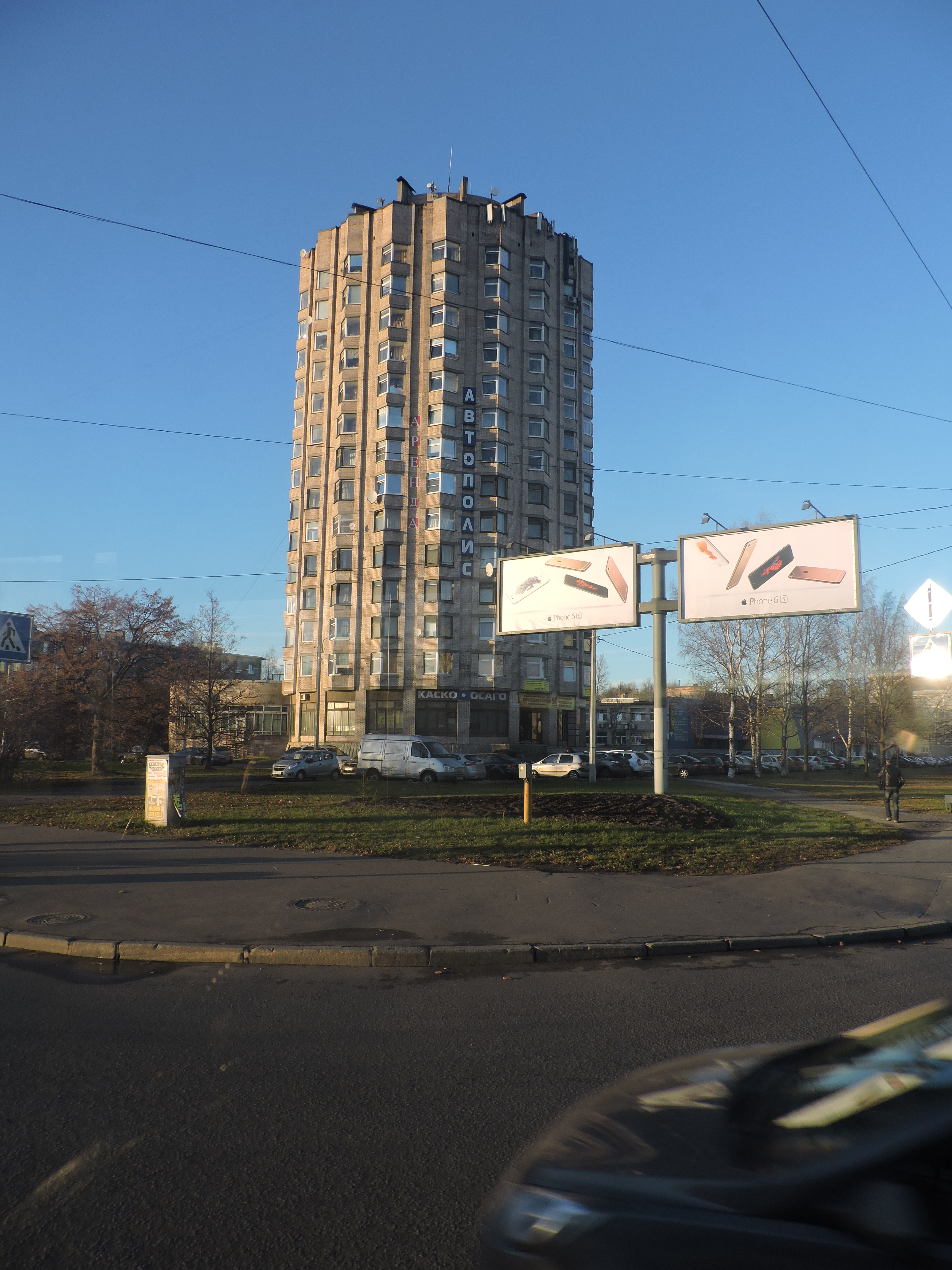 Круглая башня на проспекте Энергетиков, 24, Санкт—Петербург.